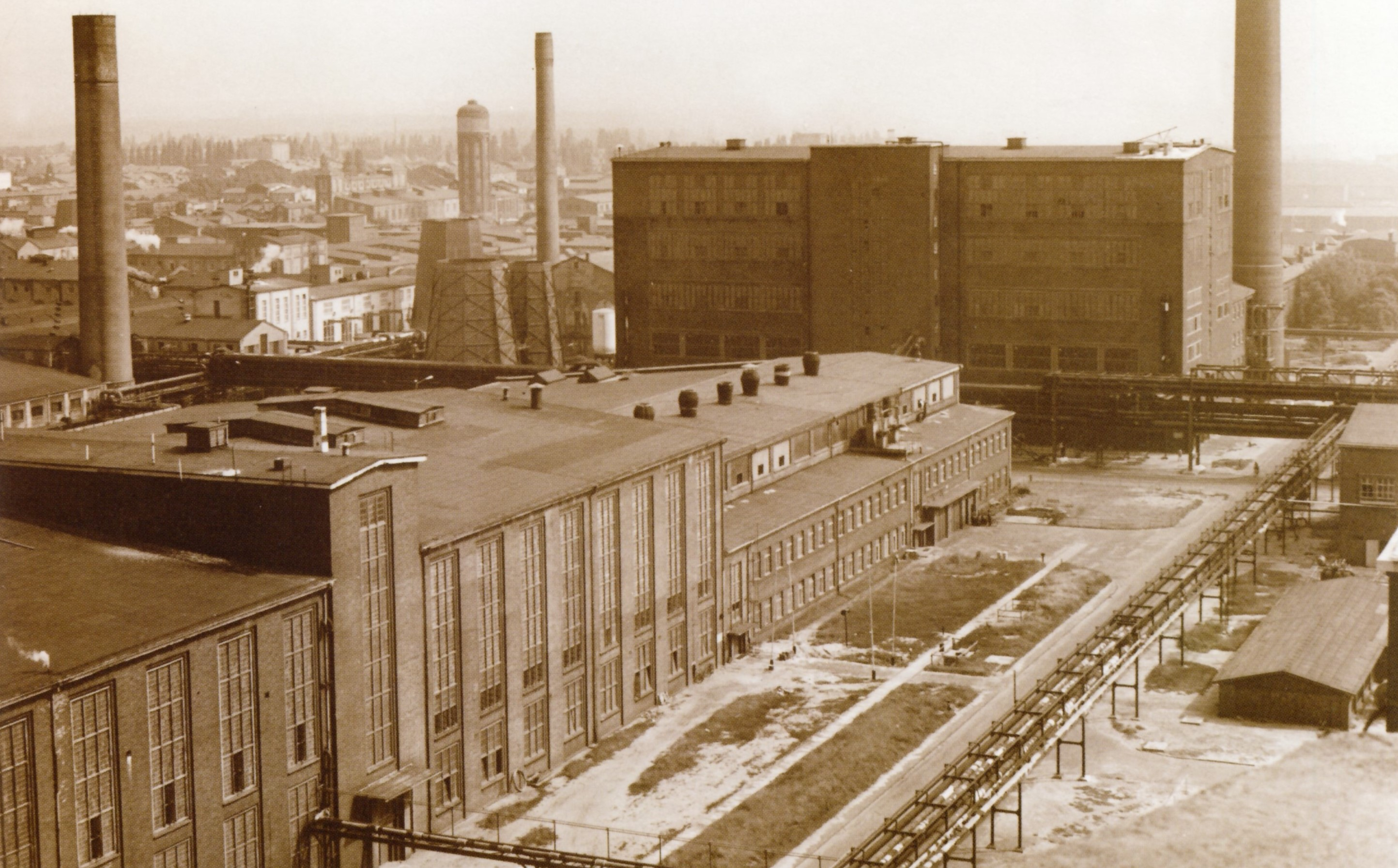 Blick vom N-Zellstoff-Betrieb auf den S-Zellstoff-Betrieb mit dem Hochhaus Geb. 621